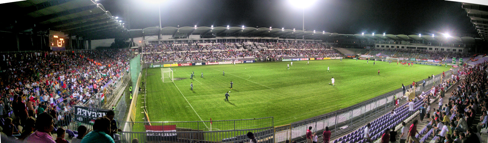 Az újpesti Szusza Ferenc futball stadion panorámájának látképe